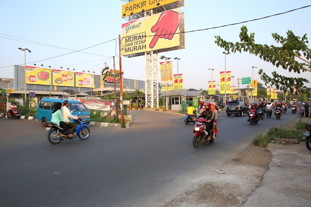 Jalan Tole Iskandar Kota Depok